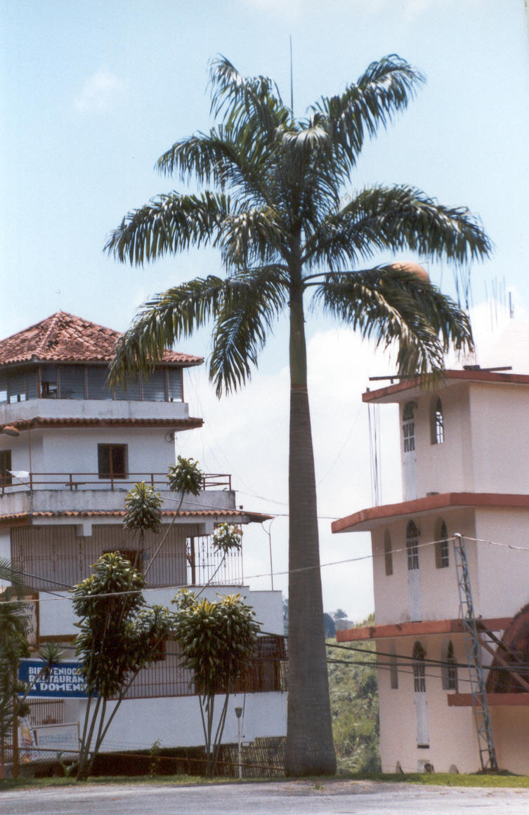 Ejemplar de chaguaramo (Roystonea oleracea). El chaguaramo es una especie de palmera de gran tamaño típica de los valles y montañas del Norte de Venezuela. Suele sembrarse en las haciendas de caña de azúcar, formando avenidas, como una especie de forma de orientación. Lugar: Potrerito, cerca de San Antonio de Los Altos (Estado Miranda, Venezuela. Fecha: Agosto 2006. Autor Fev.